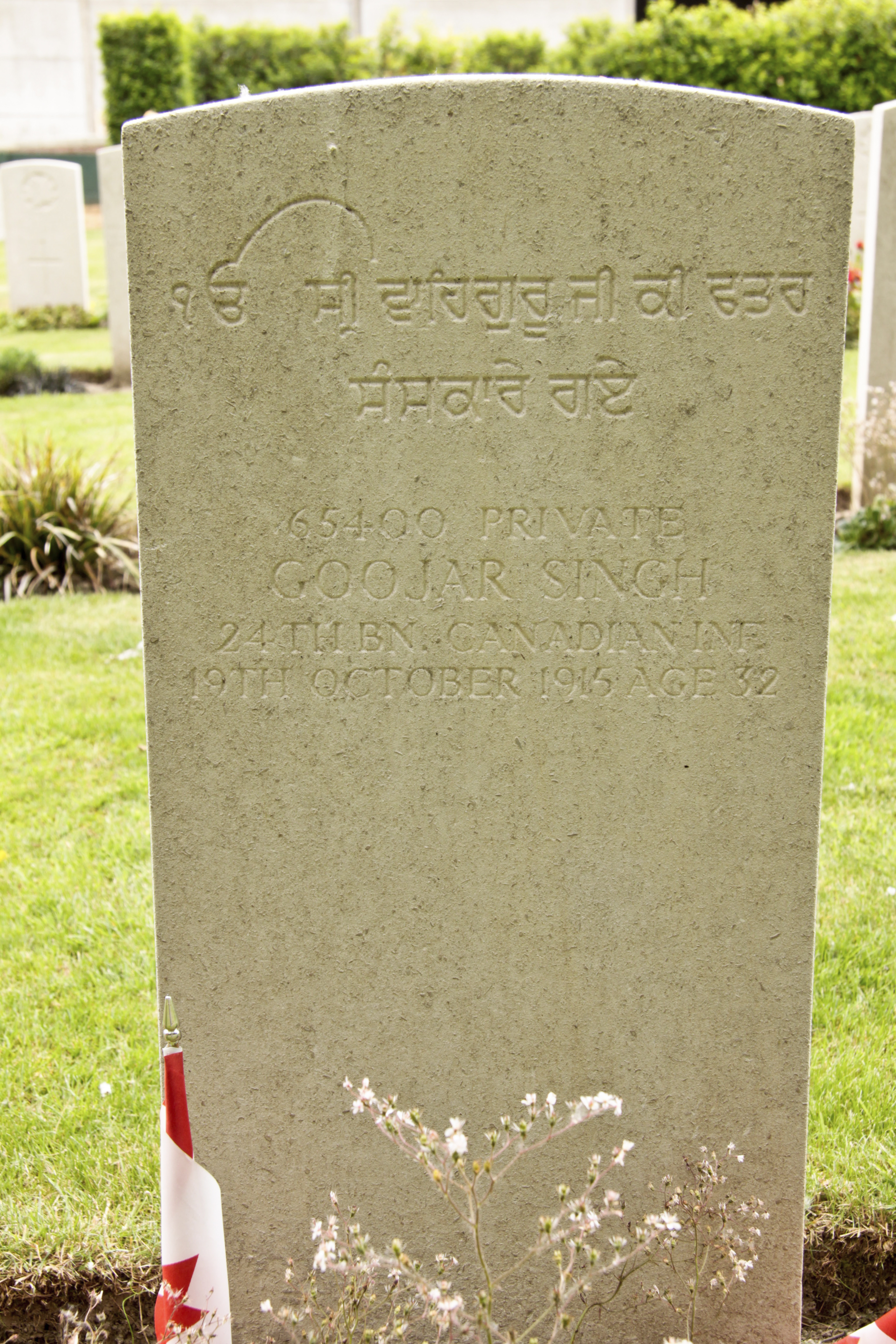 La Laiterie Military Cemetery - Graf van Goojar Singh